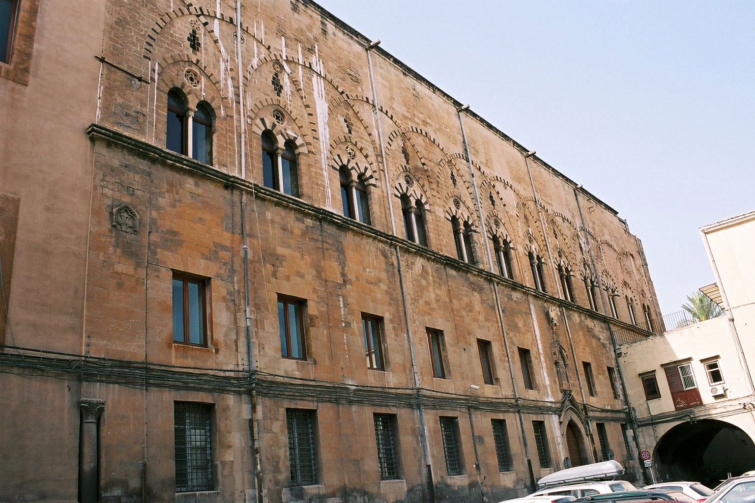 Palazzo Sclafani, Palermo South facade